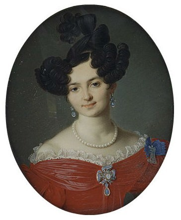 Портрет фрейлины с шифром императрицы Марии Фёдоровны и Александры Федоровны. Миниатюра попала в музей Лувра из личной коллекции барона Фернана Шевро де Кристиани (1857—1928). Изучив его родословное древо, можно утверждать, что на портрете изображена его бабушка по материнской линии — Софья Павловна Козлова (1805—08.10.1840), фрейлина двора (с 26 марта 1828). Выйдя замуж за своего двоюродного брата, Николая Дмитриевича Арсеньева (1803—09.06.1859), она была вынуждена вместе с мужем жить за границей. Оба супруга скончались во Франции и были там похоронены. Их дочь Александра Николаевна Арсеньева (1832—1893) была матерью последнего владельца миниатюры.